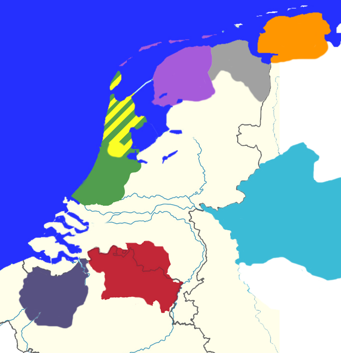 Verspreiding van pelhoenders in de Lage Landen en West-Duitsland